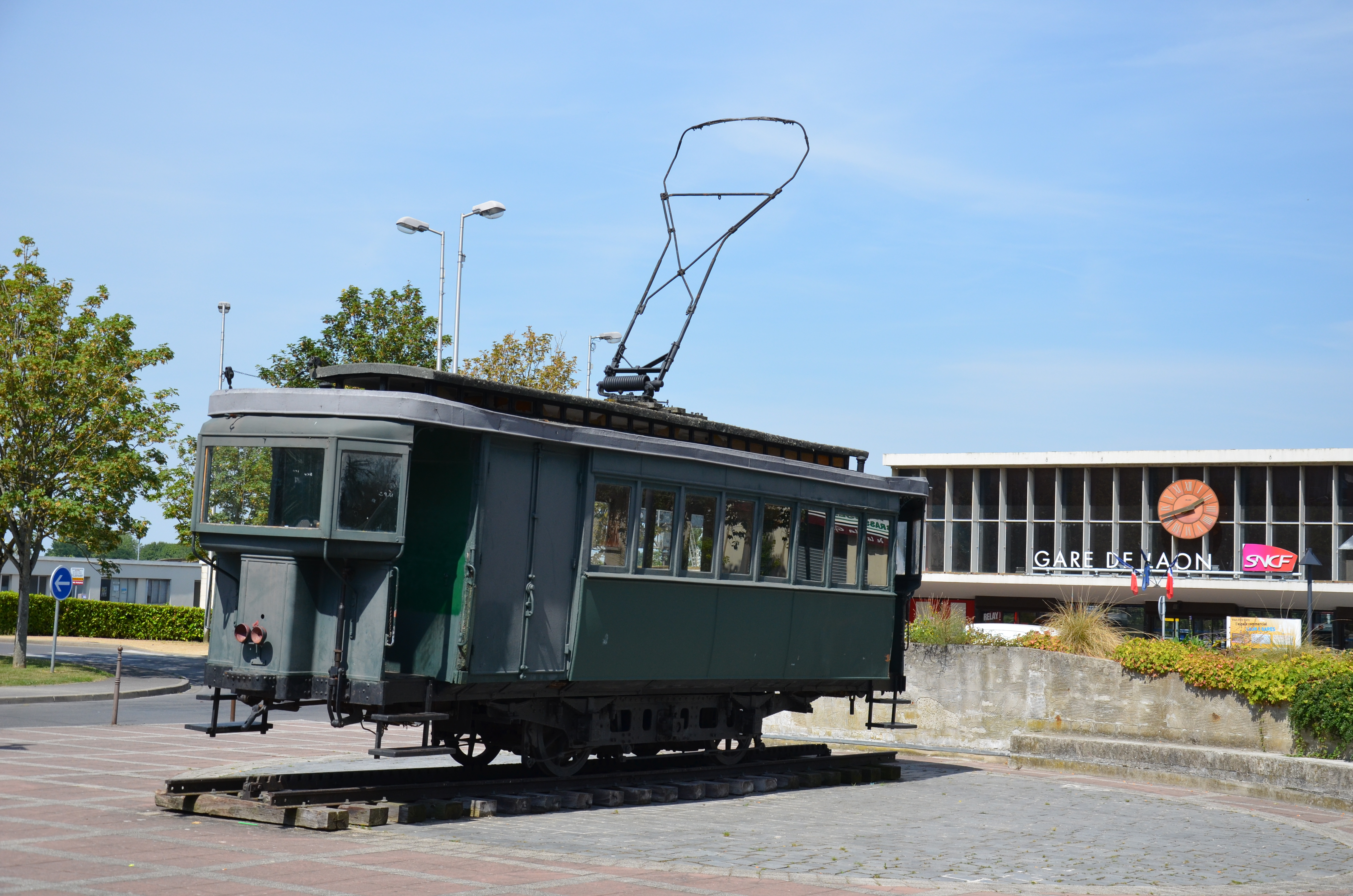 Ancienne motrice de tramway servant de monument, devant la gare de Laon.